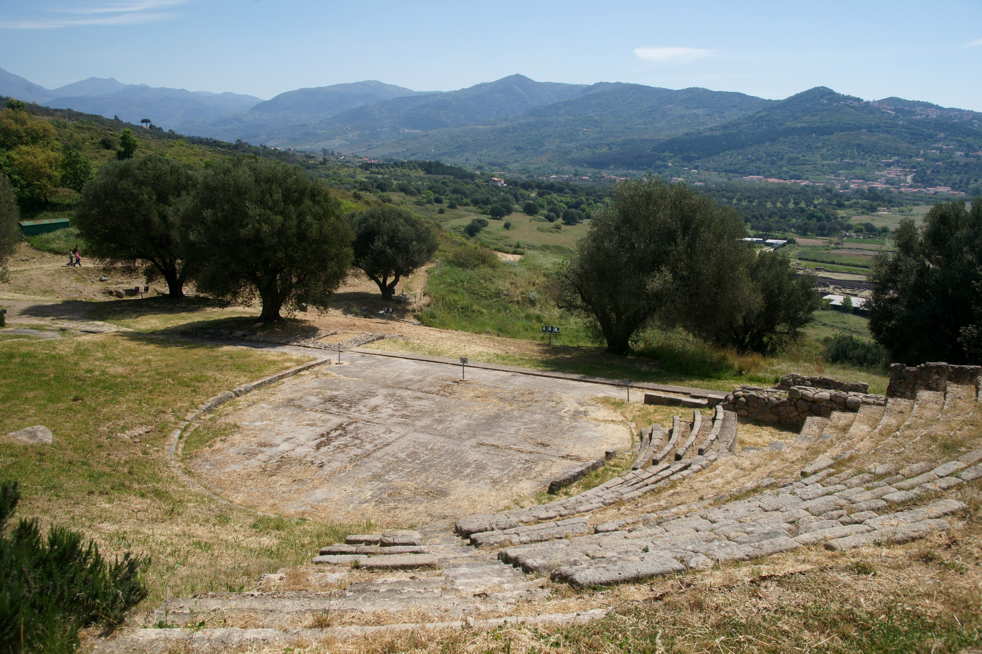 Elea - Velia: Theater